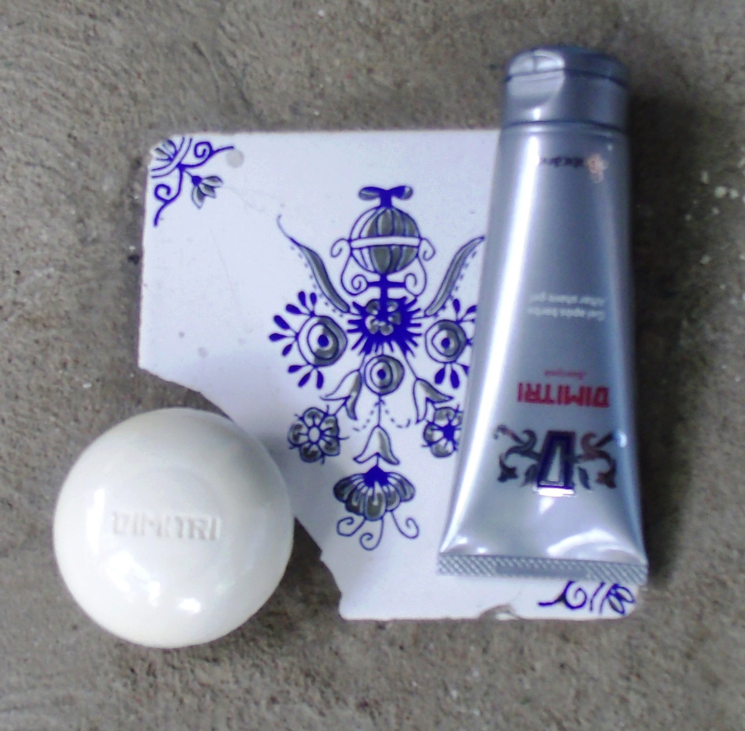 Material sobre O Boticário.